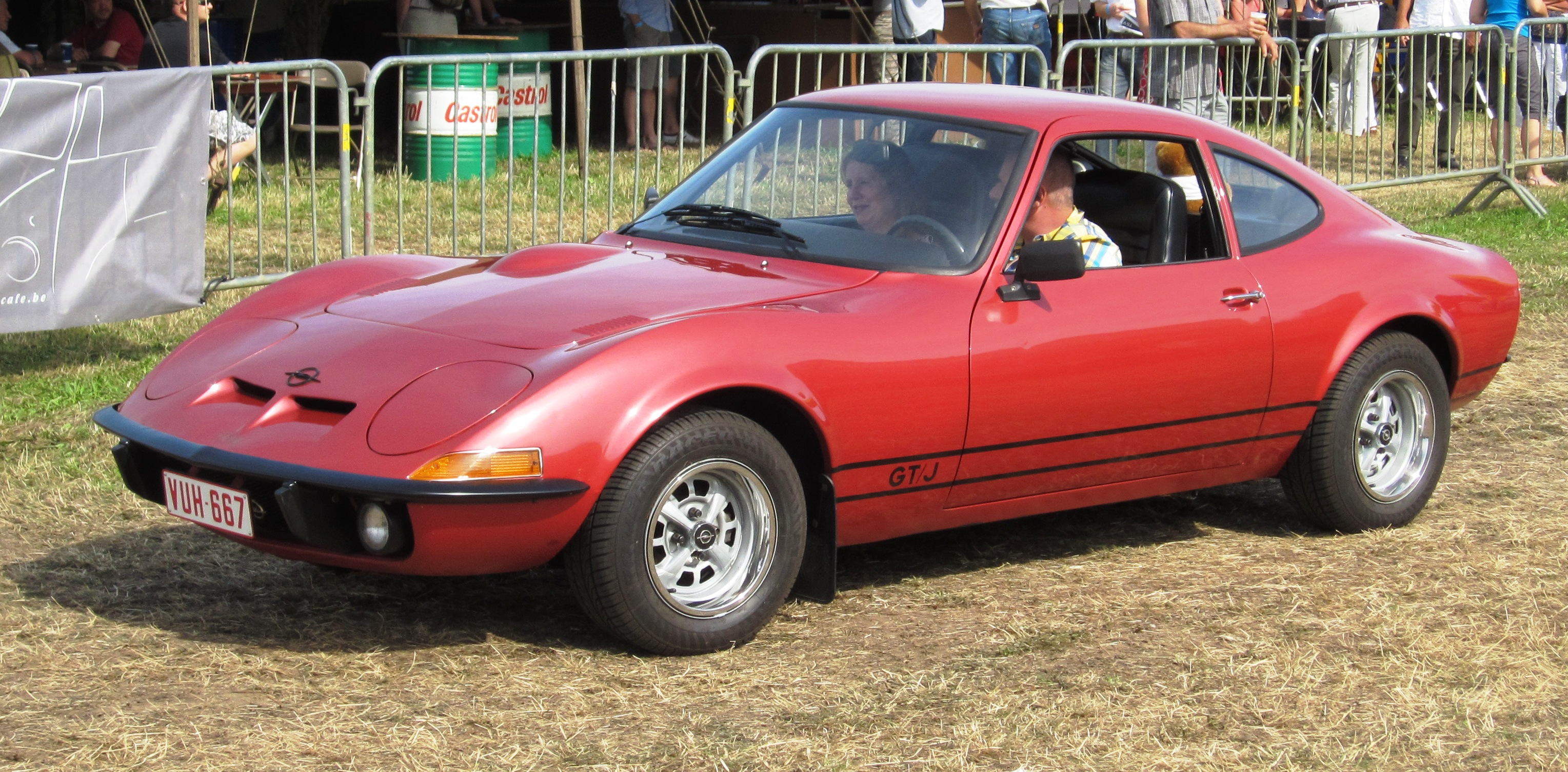 Opel GTJ de 1972 en Belgique